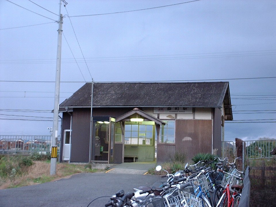 近鉄伊賀線（撮影当時。現・伊賀鉄道）桑町駅 駅舎